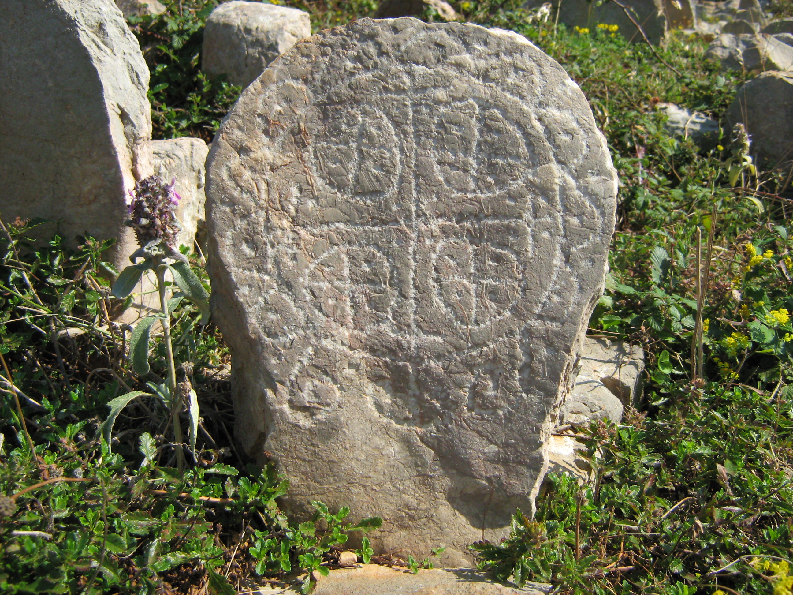 Mirila stone cemeteries in Dalmatia (Croatia), 17th to 20th century.